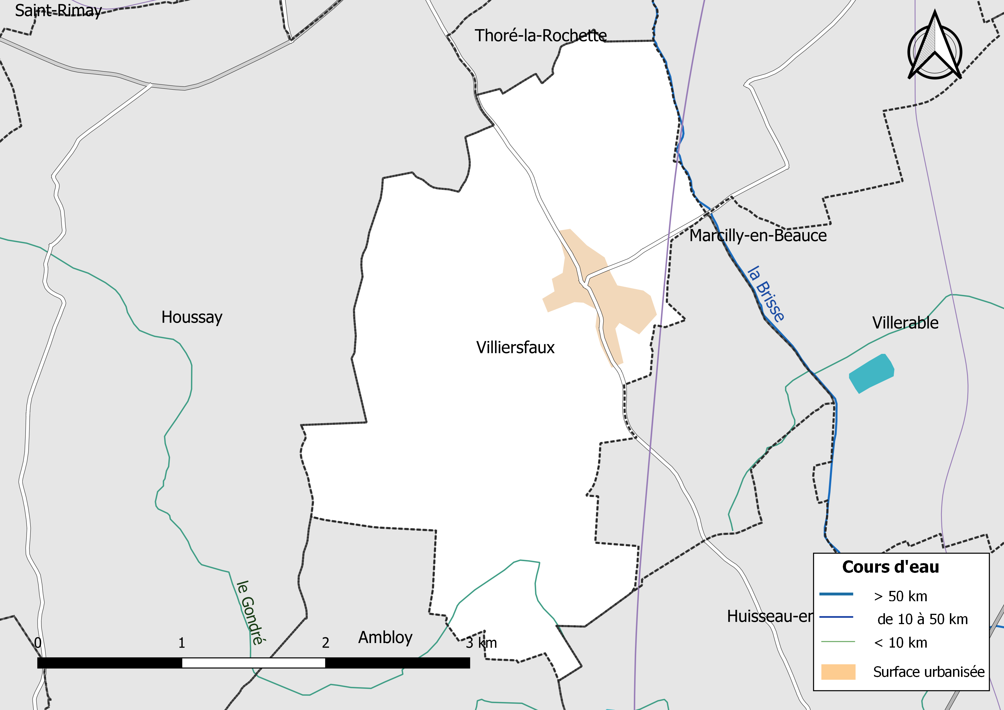 Carte du réseau hydrographique de la commune de Villiersfaux (Loir-et-Cher, France).